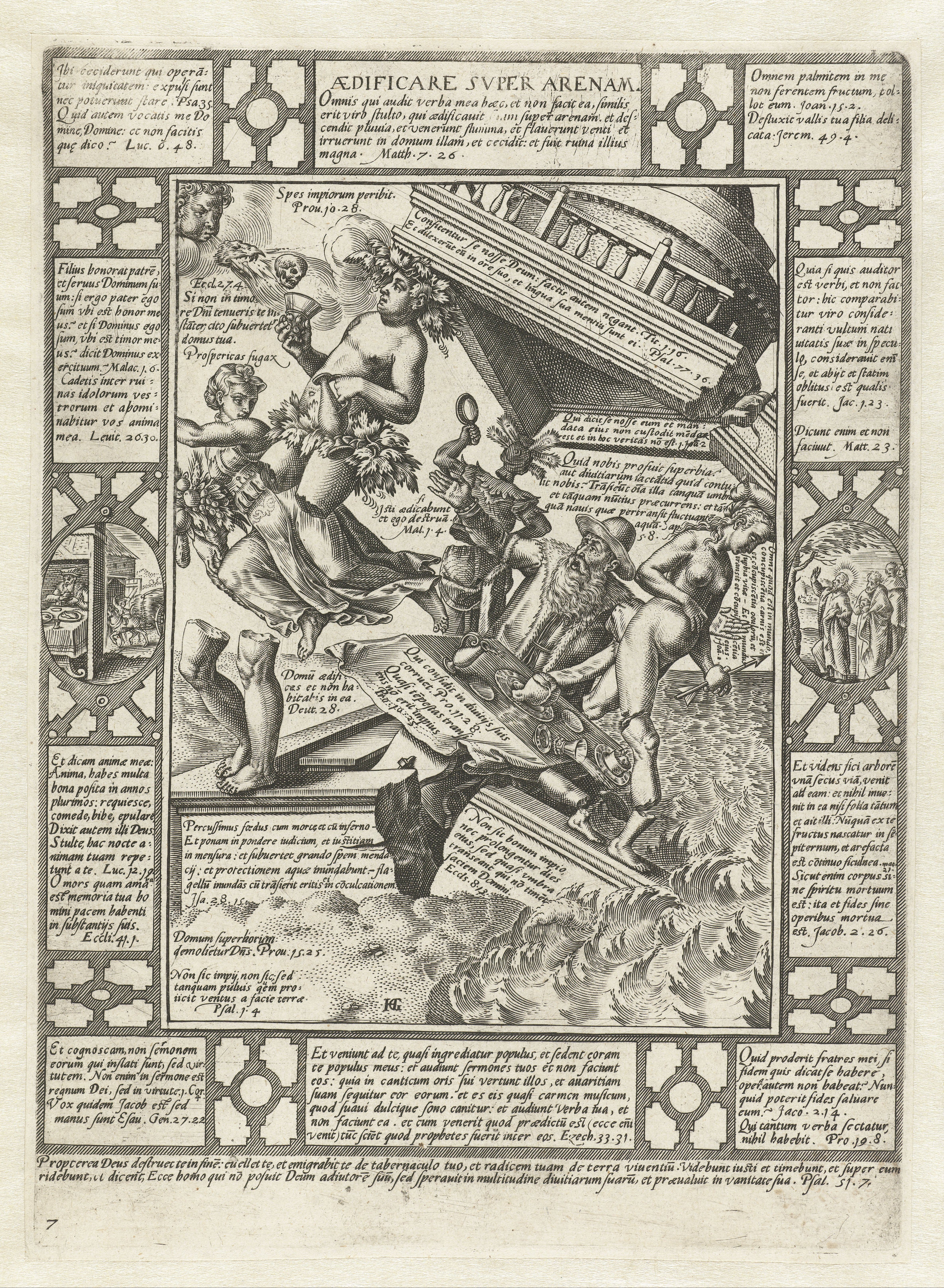 IdentificatieTitel(s): Het huis gebouwd op zandAedificare super arenam (titel op object)Allegorieën van het christelijke geloof (serietitel)Objecttype: prent Serienummer: 7/10Objectnummer: RP-P-OB-10.078Catalogusreferentie: The Illustrated Bartsch 71-2(2)Hollstein Dutch 72New Hollstein Dutch 65-2(2)Opschriften / Merken: monogram, links van het midden, onder, gegraveerd: ‘HG’verzamelaarsmerk, verso linksonder, gestempeld: Lugt 240Omschrijving: Serie van tien (oorspronkelijk twaalf) allegorieën van het christelijke geloof. Elk van de allegorieën bestaat uit een centrale voorstelling met daaromheen een omlijsting Waar: in citaten uit de bijbel gecombineerd zijn met de verbeelding van bepaalde gebeurtenissen uit de bijbel. In de marge onderaan twee regels Latijn en het nummer 7.VervaardigingVervaardiger: prentmaker: Hendrick Goltzius (vermeld op object)naar eigen ontwerp van: Hendrick Goltziusuitgever: Hendrick Hondius (I) (mogelijk)Plaats vervaardiging: prentmaker: Haarlemuitgever: Den HaagDatering: 1598 - 1604Fysieke kenmerken: gravureMateriaal: papier Techniek: graveren (drukprocedé)Afmetingen: plaatrand: h 256 mm × b 186 mmOnderwerpWat: house built upon a rock; house built upon sand ~ doctrine of Christ on love, etc. (Matthew 7:24-27; Luke 6:47-49)Verwerving en rechtenVerwerving: overdracht van beheer 1816Copyright: Publiek domein